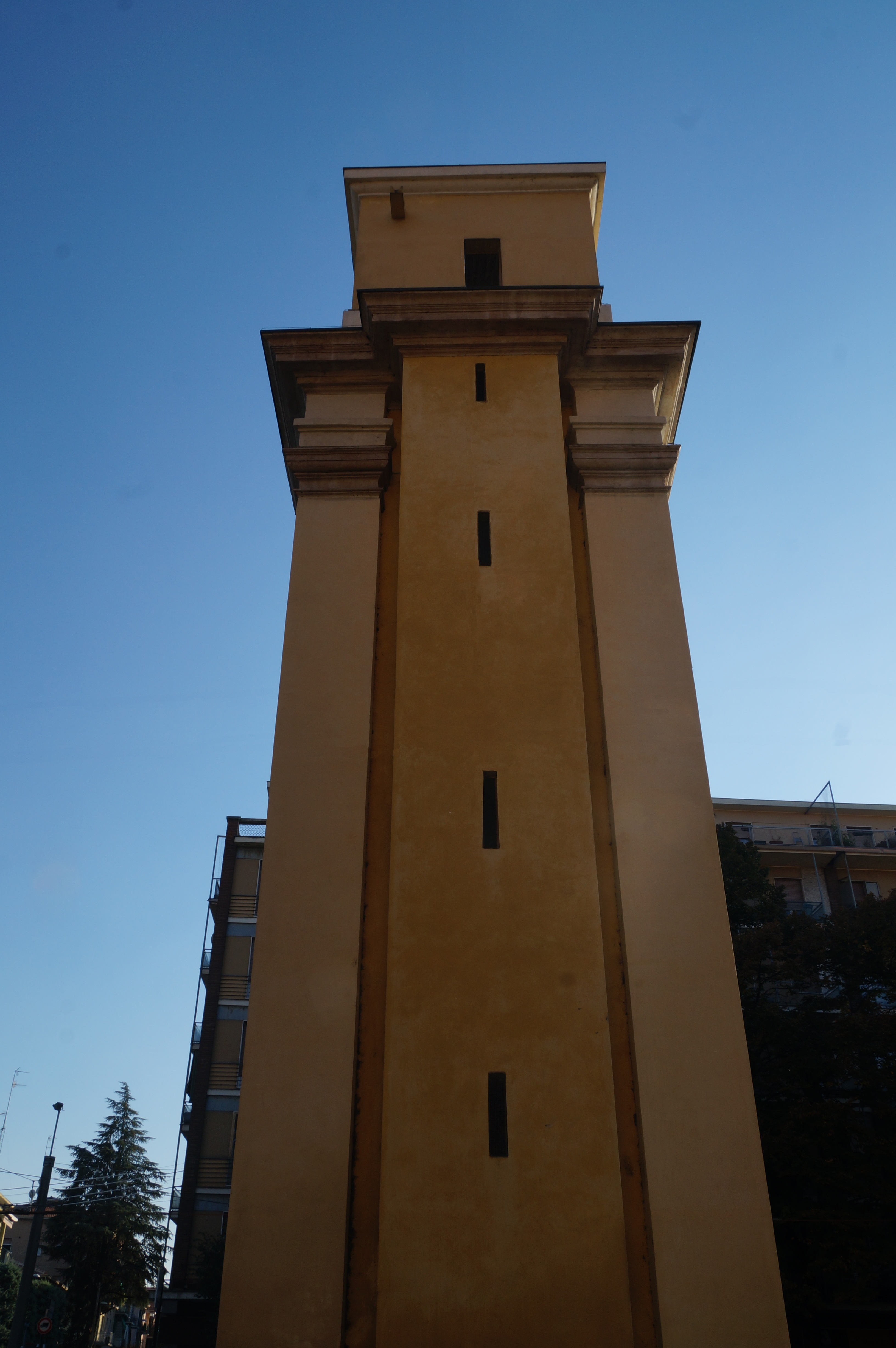 arco di San Lazzaro visto dal fianco This is a photo of a monument which is part of cultural heritage of Italy.